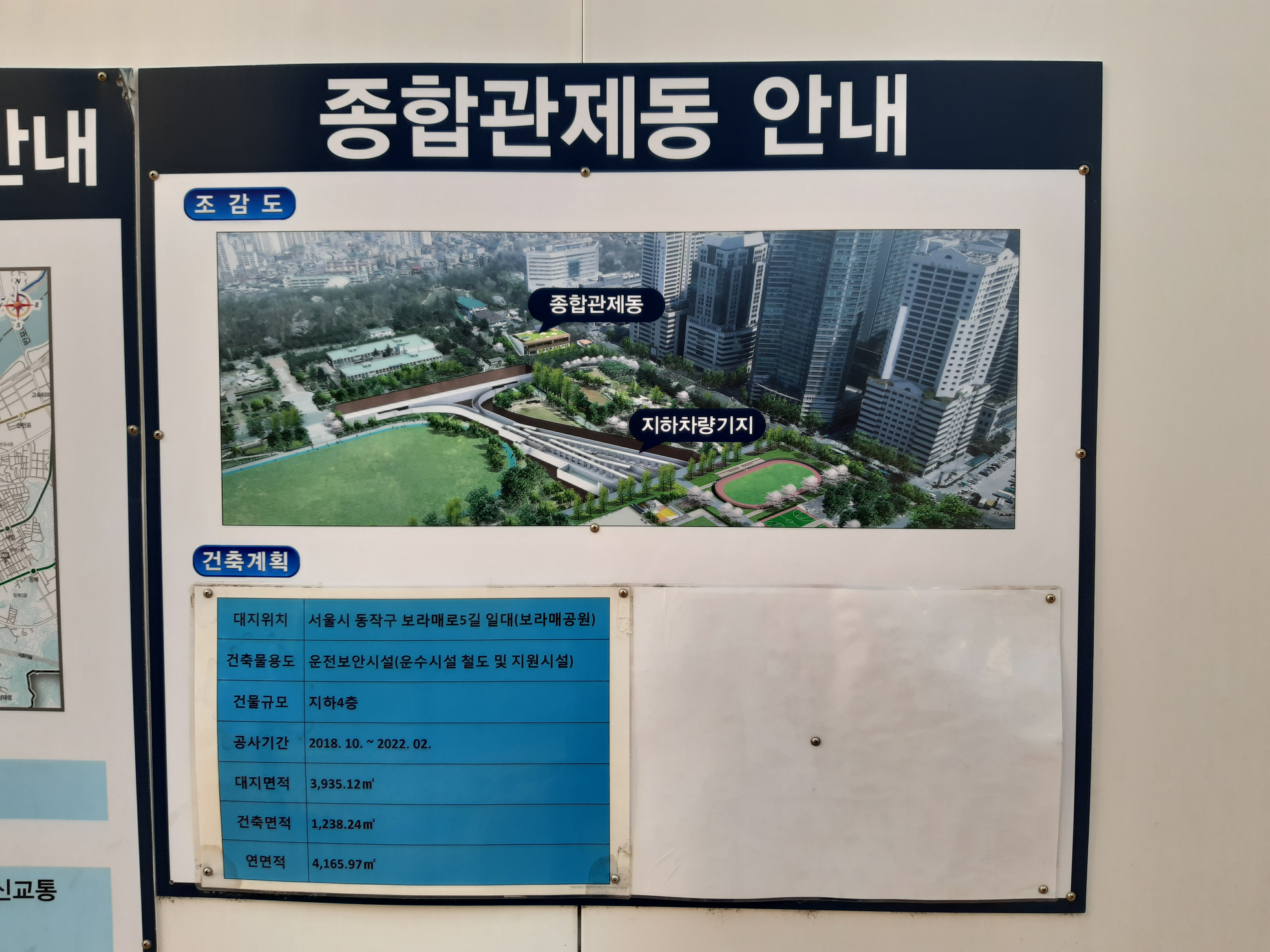 신림선종합관제동 건설안내판